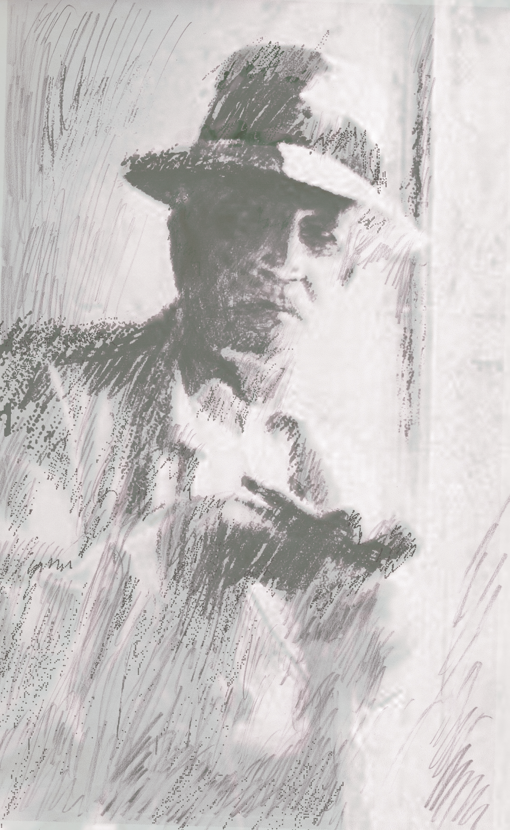 レオン・ラテリエ（イラスト）